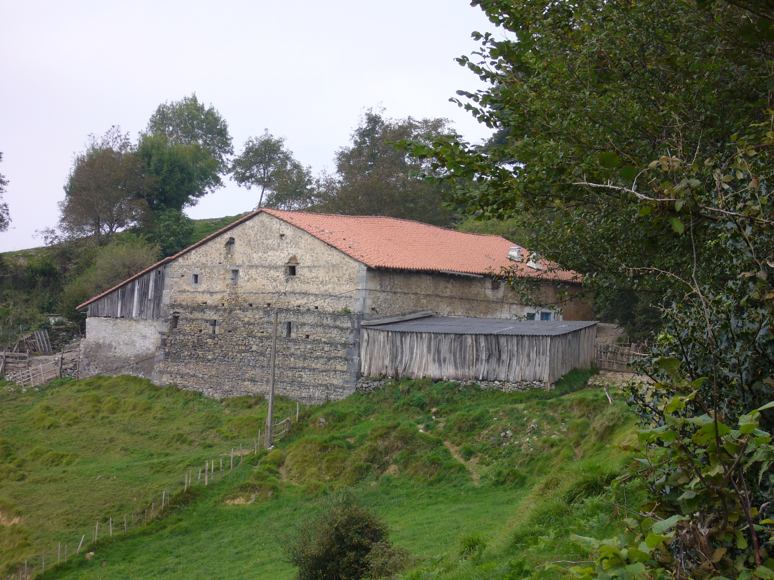 Semeola baserria